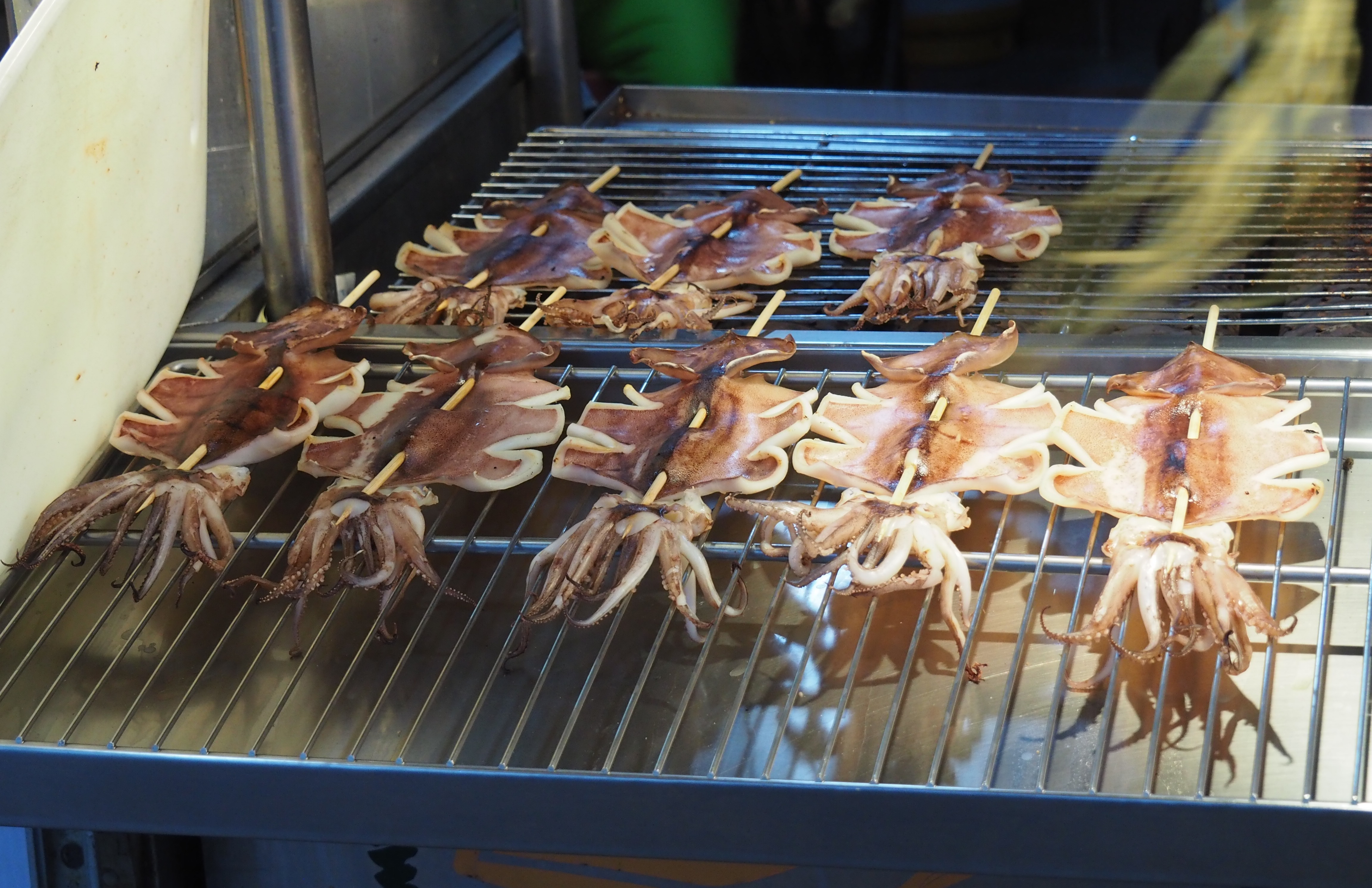 Danshui